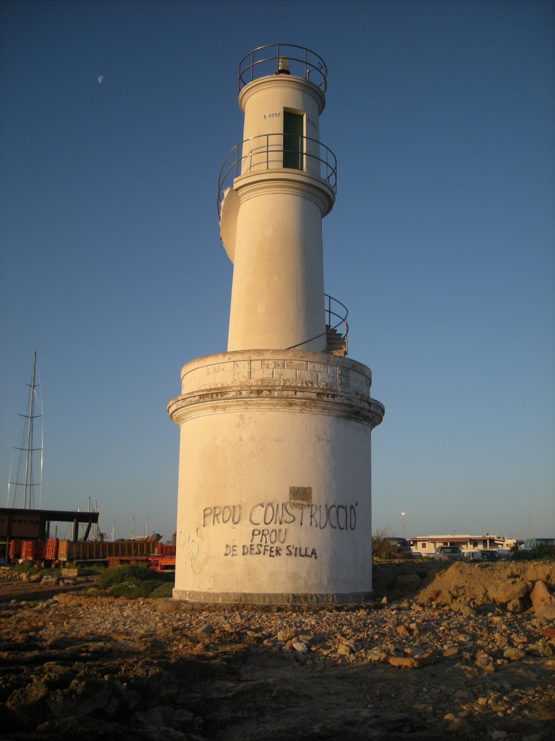 Far de La Savina, a Formentera, Illes Balears. Text de la pintada: "Prou construcció. Prou de desfer s'illa"